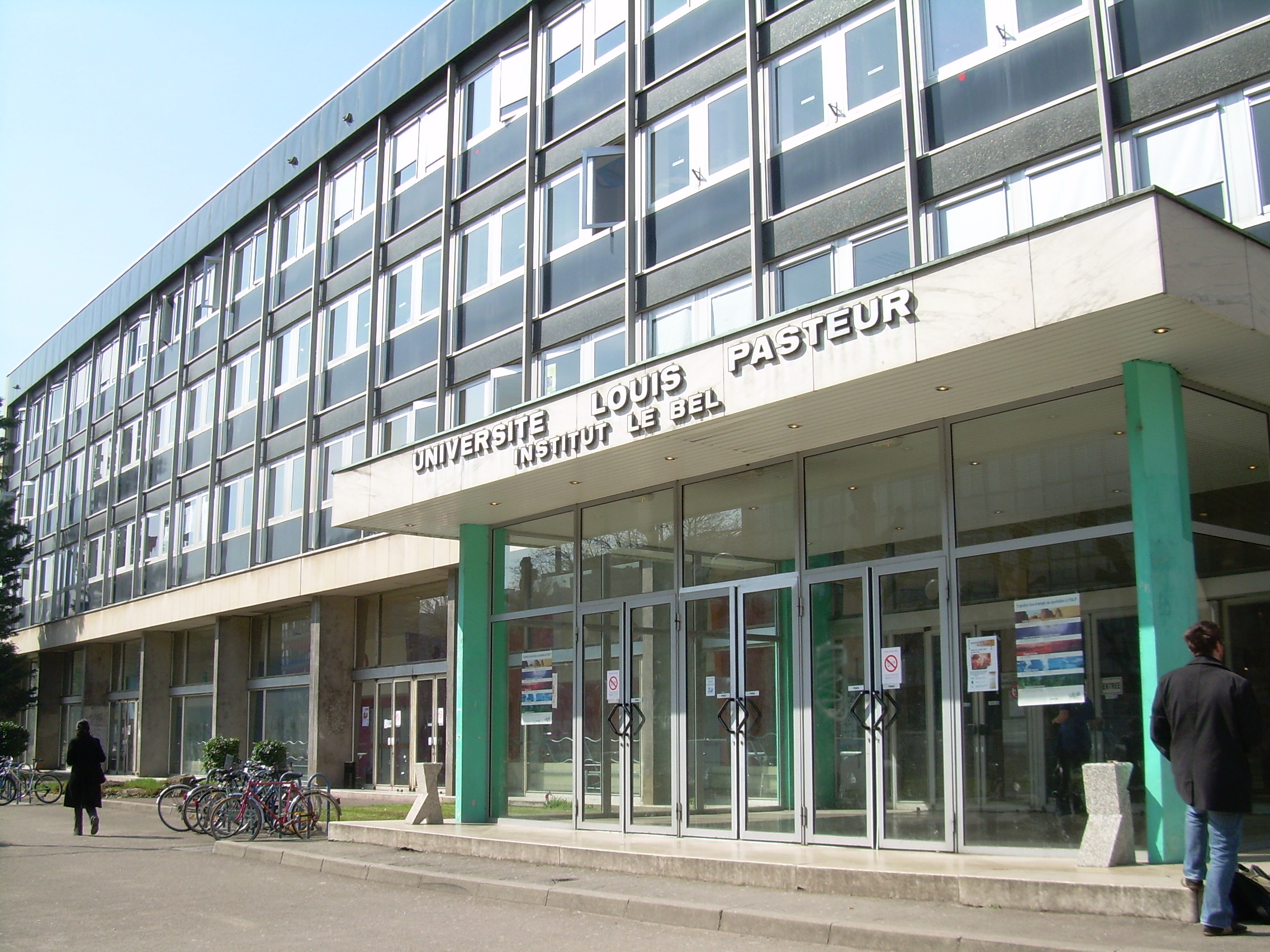 Entrée du bâtiment de l'Institut Le Bel, à l'Université Louis-Pasteur (Strasbourg I) (France).